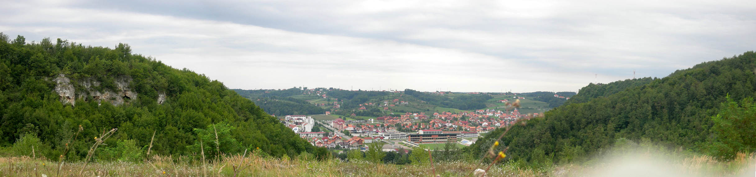 Panoramni prikaz dijela naselja Ugljevik sa jednog od obliznjih brda. Ispred se vidi i pecina. avgust 2006. godine